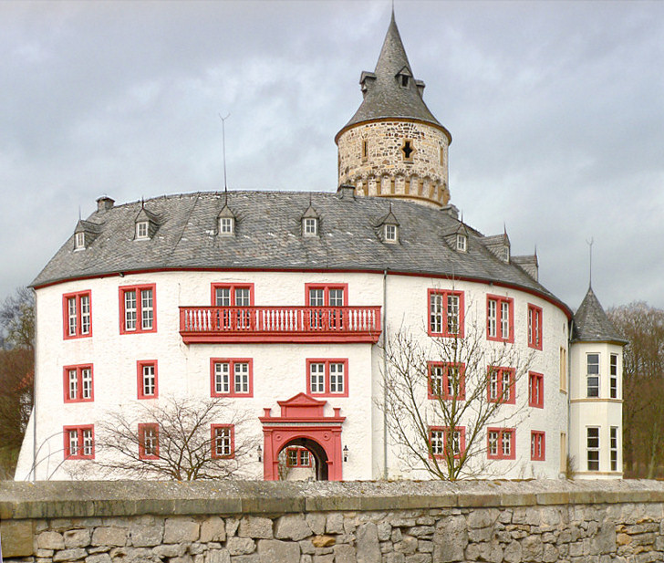 Schloss Oelber am weißen Wege, Südseite. Foto aufgenommen von Benutzer Benutzer:AxelHH, April 2006.